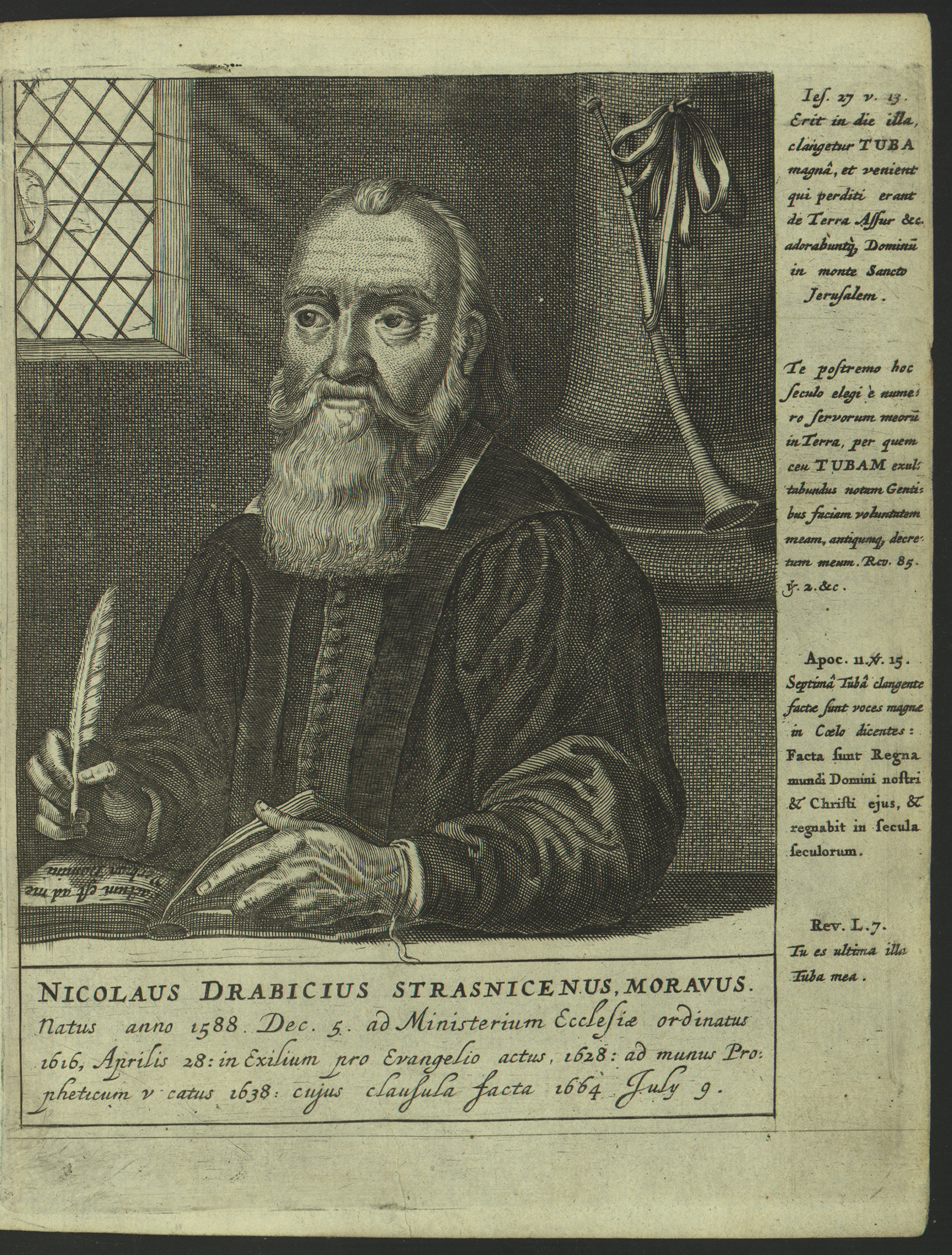 Mědirytinový portrét Mikuláše Drabíka z r. 1665